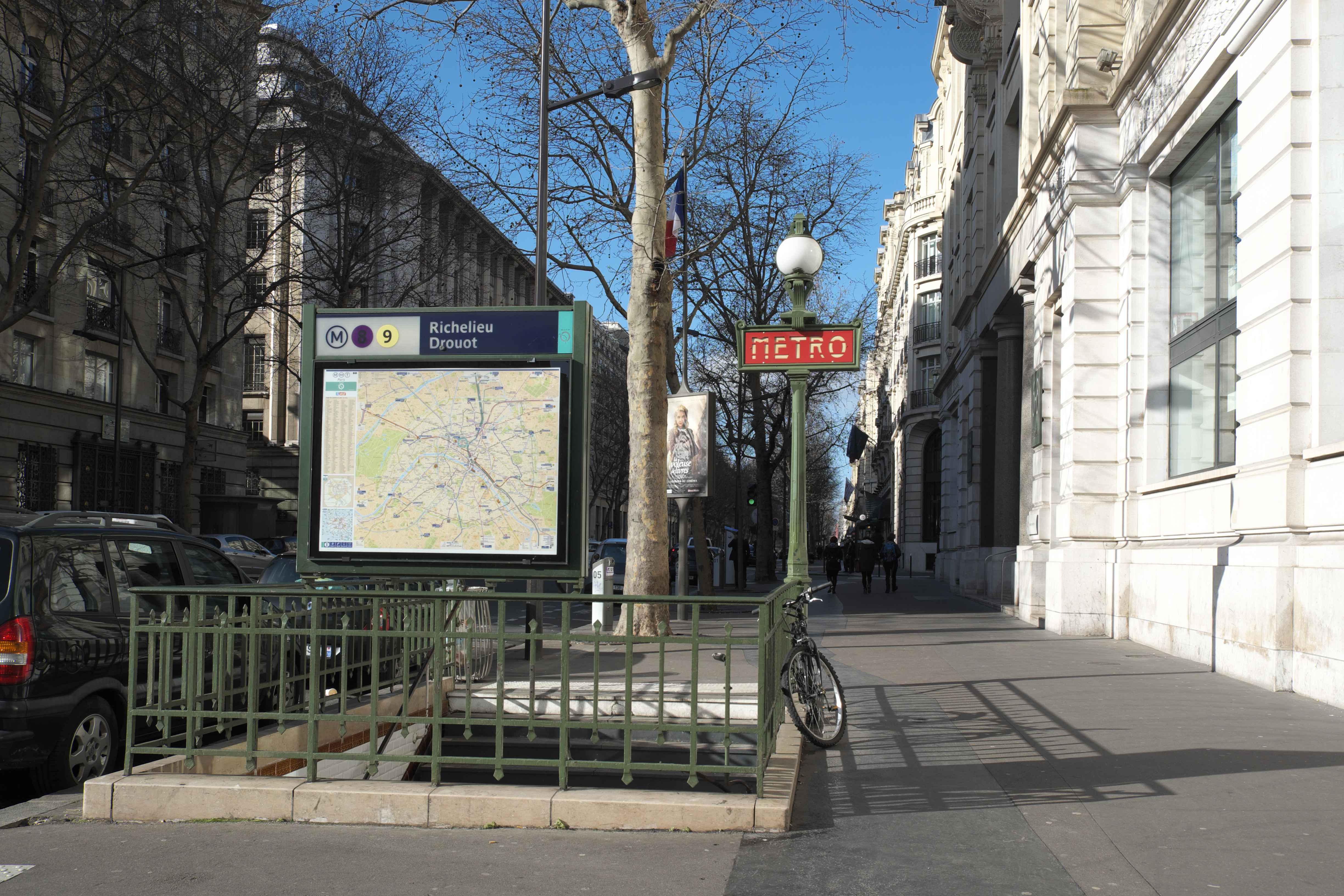 Métrostation Richelieu – Drouot (Métro Paris) am Boulevard Haussmann im 9. Arrondissement in Paris